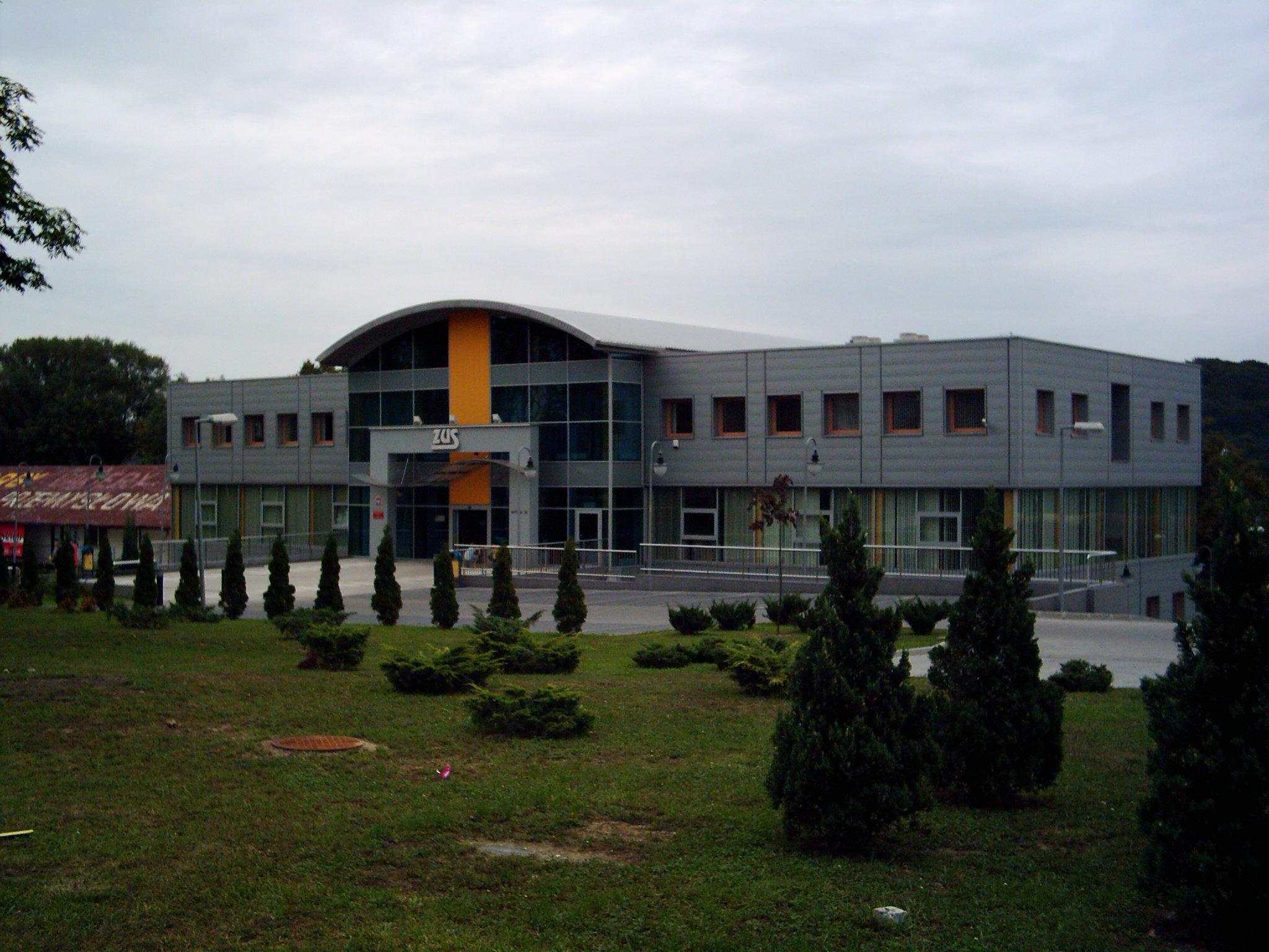 Wodzisław Śląski - Budynek ZUS-u .